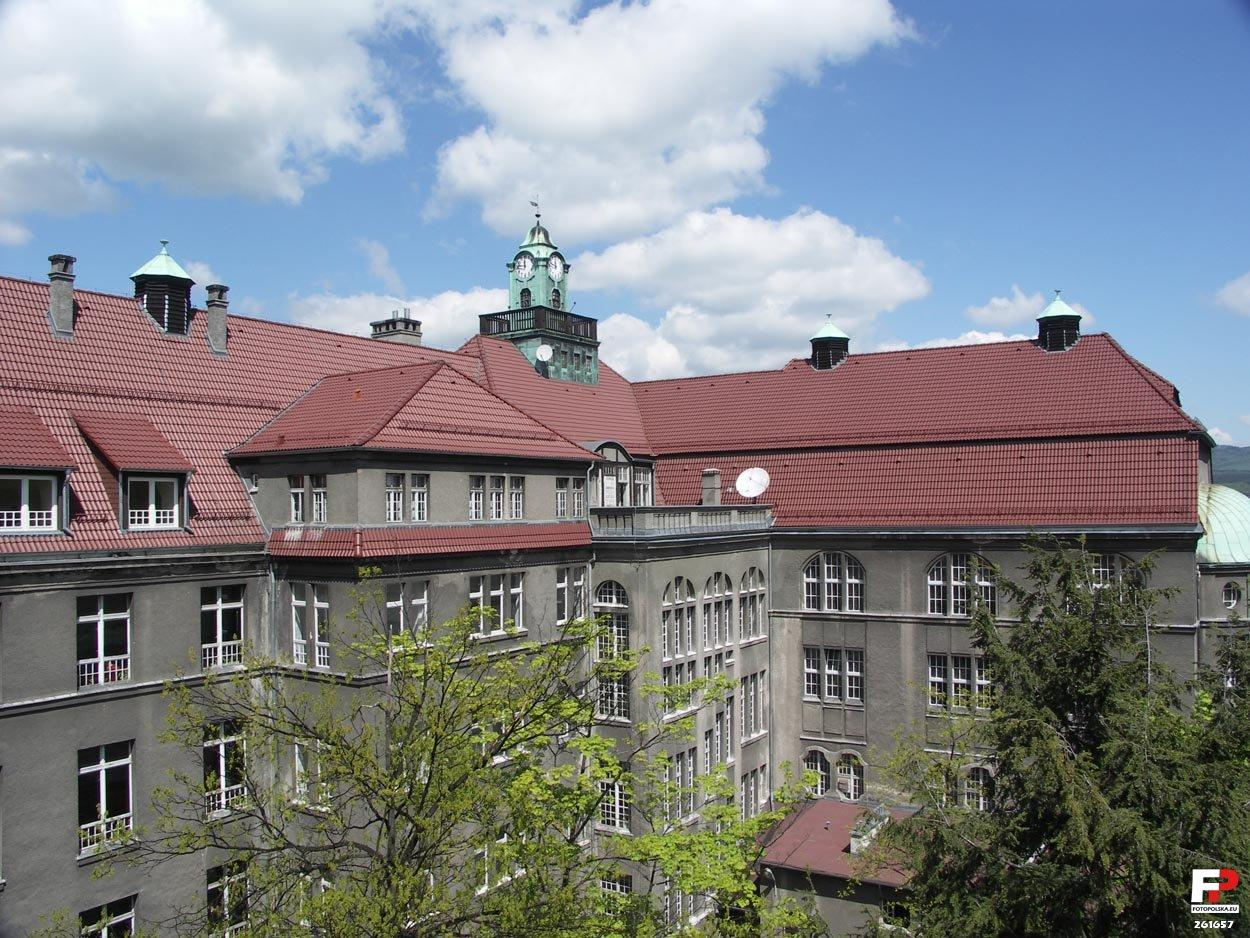 Budynke szkoły z wieżą widokową (zamkniętą dla postronnych!) i zegarem.